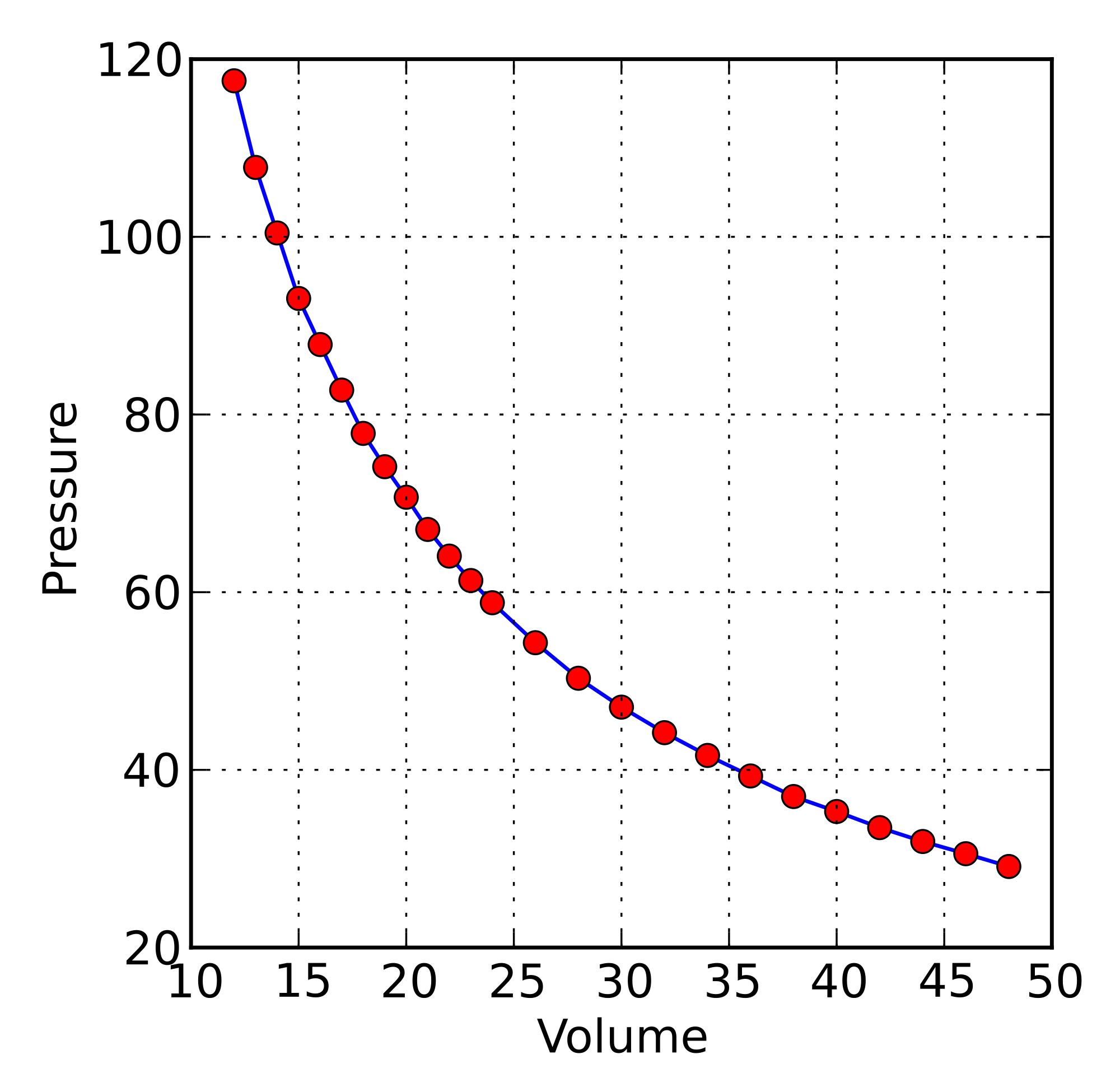 Graf sa Boyleovim izvornim rezultatima eksperimenta